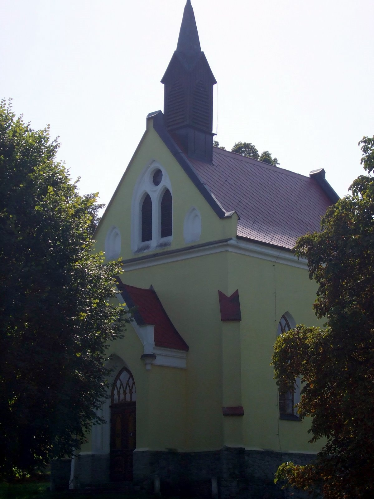 kostel svatého Václava v Chodské Lhotě v roce 2008.